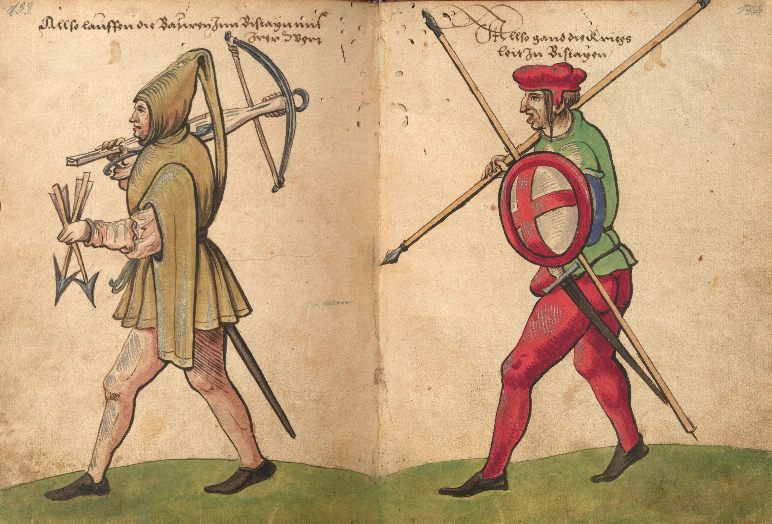 "Trachtenbuch" des Christoph Weiditz, Germanisches Nationalmuseum Nürnberg, Hs. 22474. Bl. 133–134 Baskischer Bauer mit seiner Wehr / Baskischer Kriegsmann